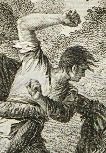 Autor: Cervantes Saavedra, Miguel de, 1547-1616 Descripción bibliográfica: El ingenioso hidalgo D. Quijote de la Mancha / compuesto por Miguel de Cervantes Saavedra ; tomo I [-IV] . - 4ª ed. corr. por la Real Academia Española. - Madrid : en la imprenta real, 1819. - 4 vol. : il., grab. calc., mapa pleg. ; 19 cm Notas: Los tomos 1 y 2 son la primera parte del Quijote y los tomos 3 y 4 son la segunda parte del Quijote . - Grab. en port. con el lema de la Real Academia Española: "Limpia, fija y da esplendor" Grabador: Blanco, Alejandro Grabador: López Enguindanos, Tomás Dibujante Rivelles, José Localización